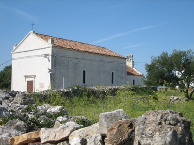 Church of St. Nicolas near Veli Losinj / Crkva svetog Nikole nedaleko od Velog Losinja